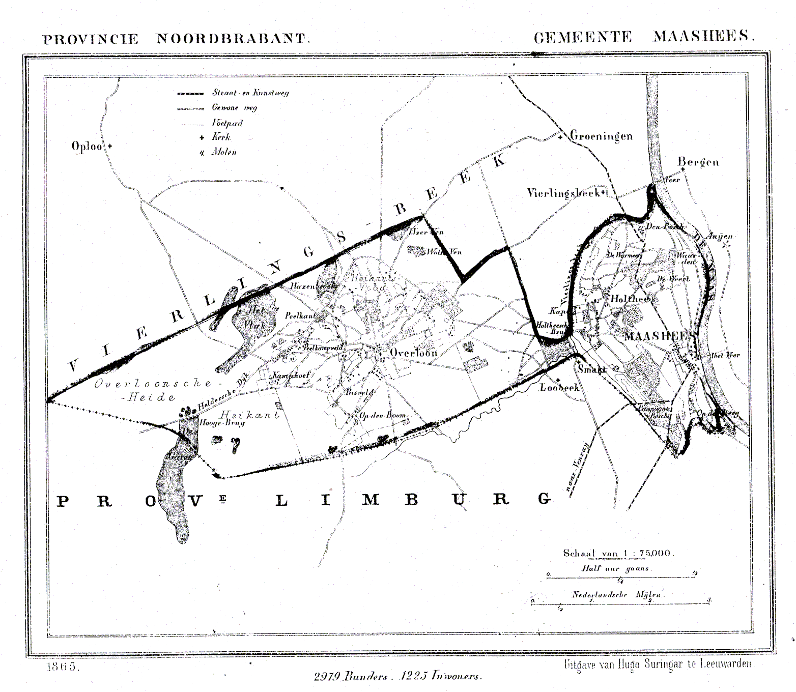 Nederland, Noord-Brabant, Gemeente Maashees